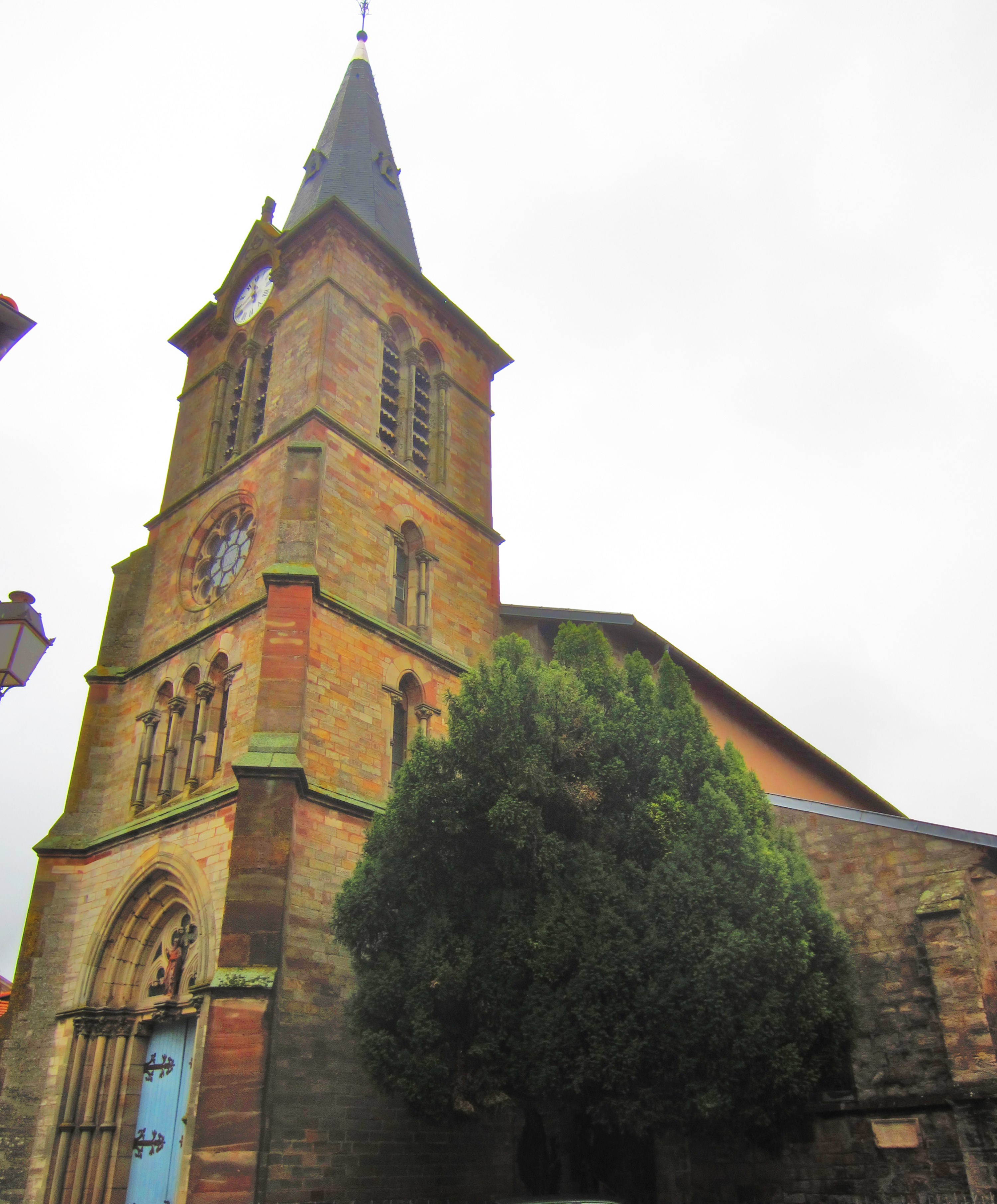 Eglise Vic Seille